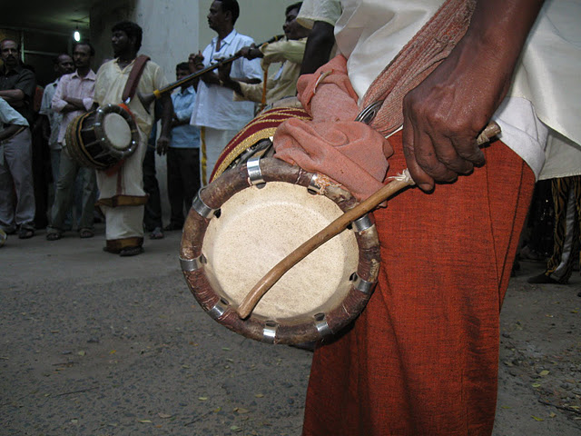 தமிழ் மரபின் மிகத் தொன்மையான வாத்தியமான உருமி மேள இசைக்கருவி